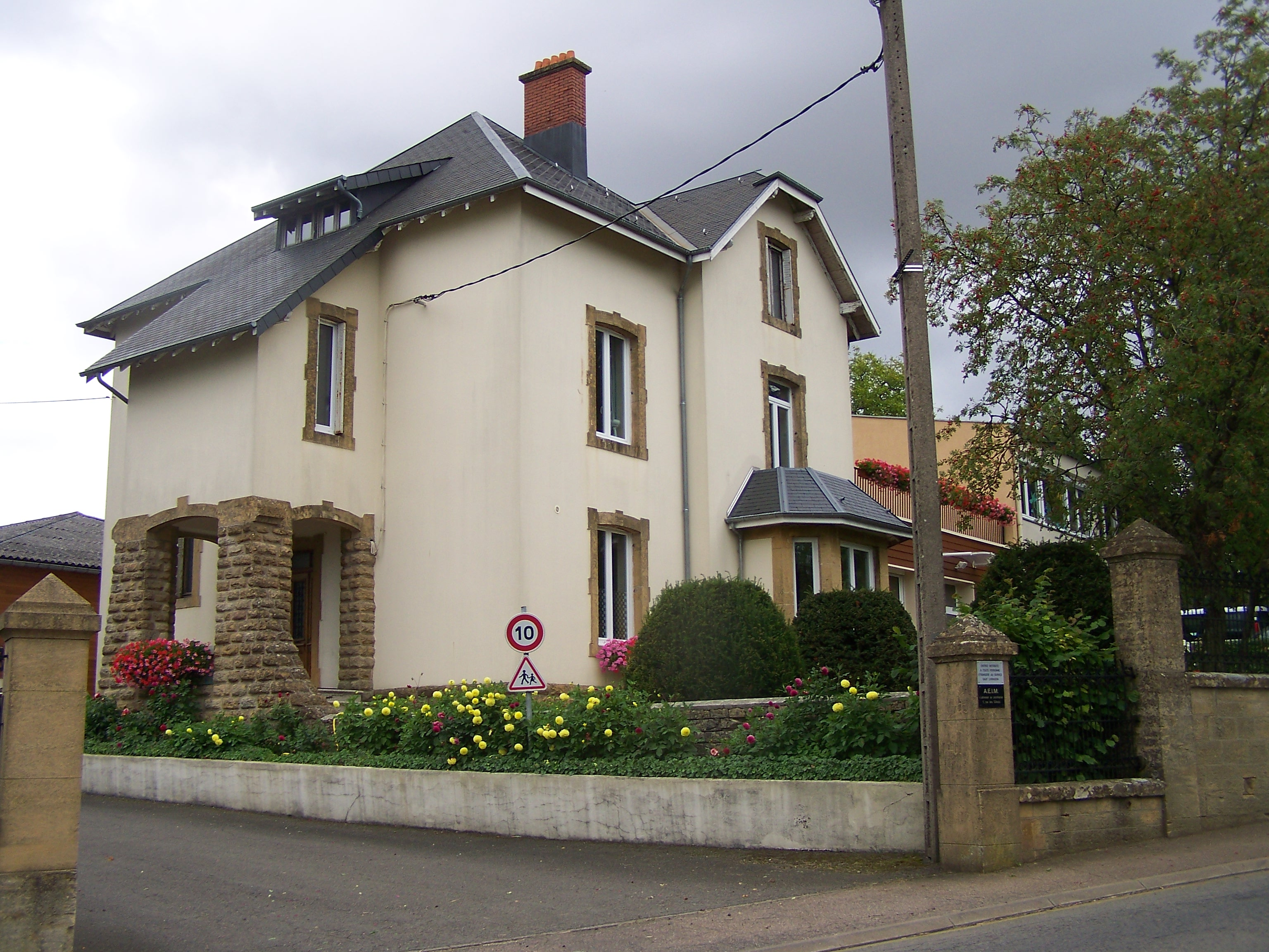 Centre AEIM de Chénières